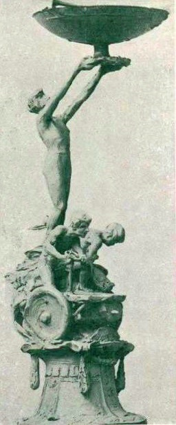 La Coupe d'Or de l'Automobile Club de Milan, remise en 1906 à Vincenzo Lancia pour sa victoire dans l'épreuve d'endurance du même nom (4 000 km) - La Vie au Grand Air du 23 mars 1906, p.234